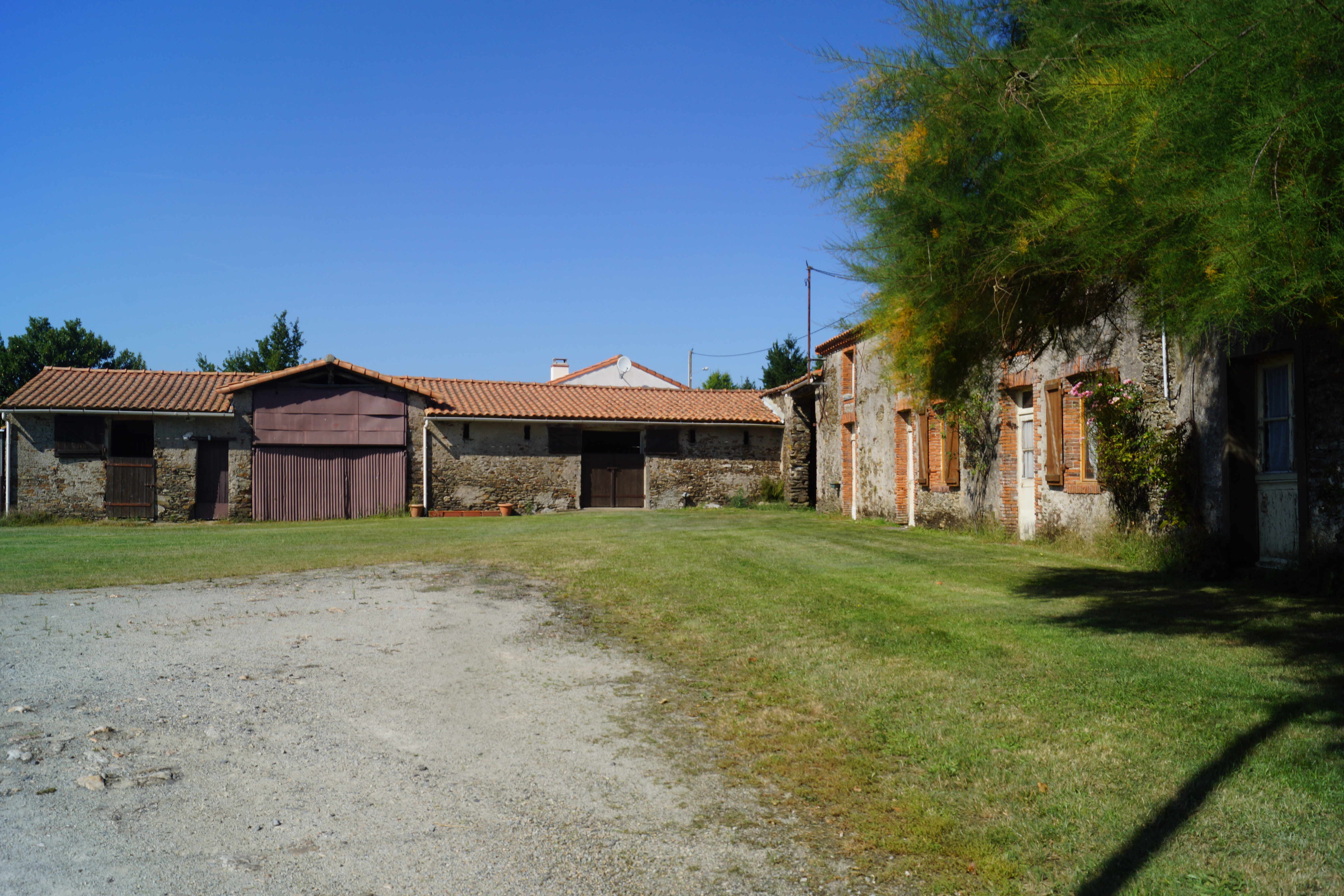 Il s'agit de la basse cour de l'ancien logis seigneurial aujourd'hui détruit